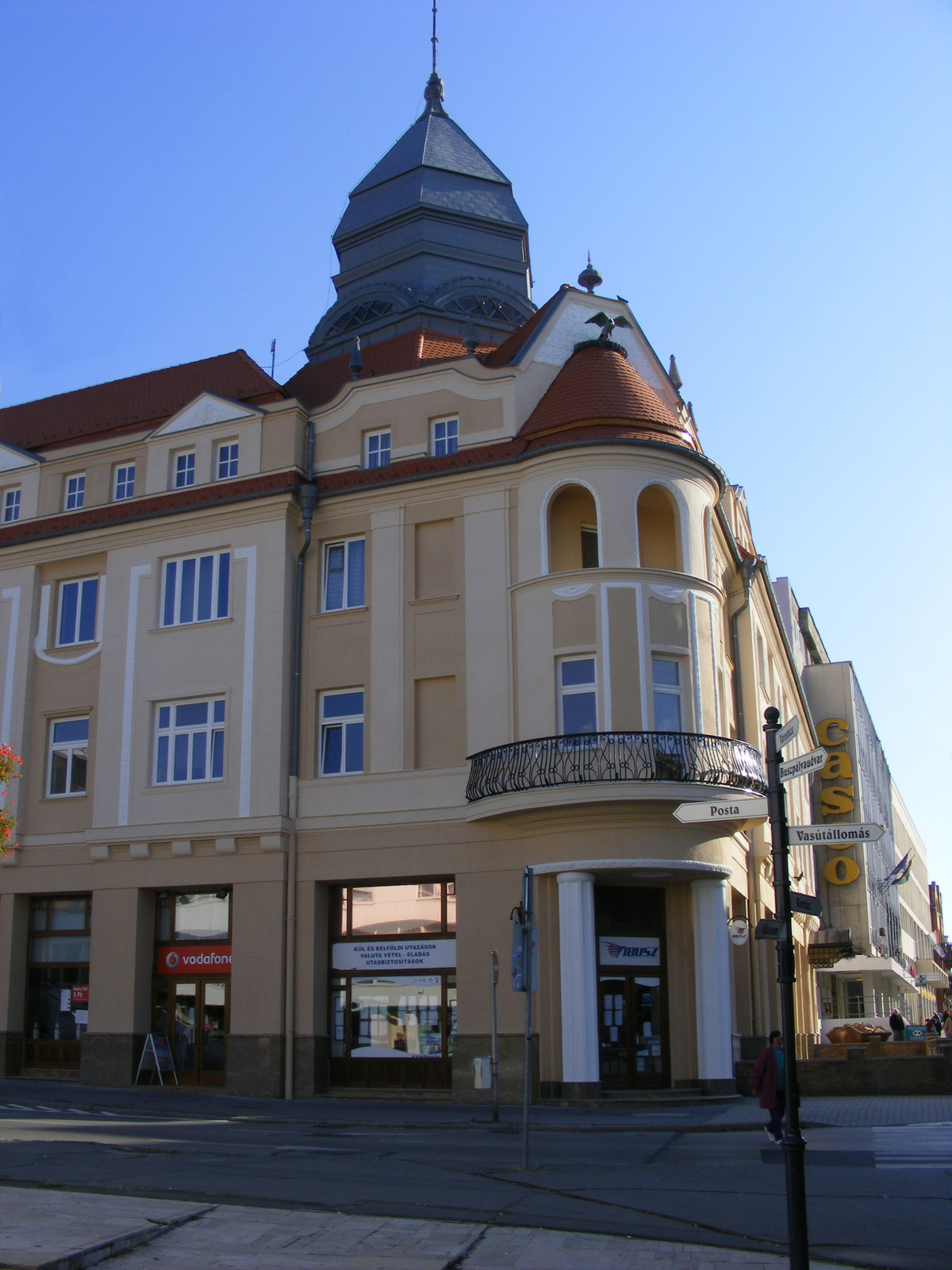 Egyem. lakóház, u.n. Dorottya-ház (Kaposvár, Fő utca 1.) This is a photo of a monument in Hungary. Identifier: -12833